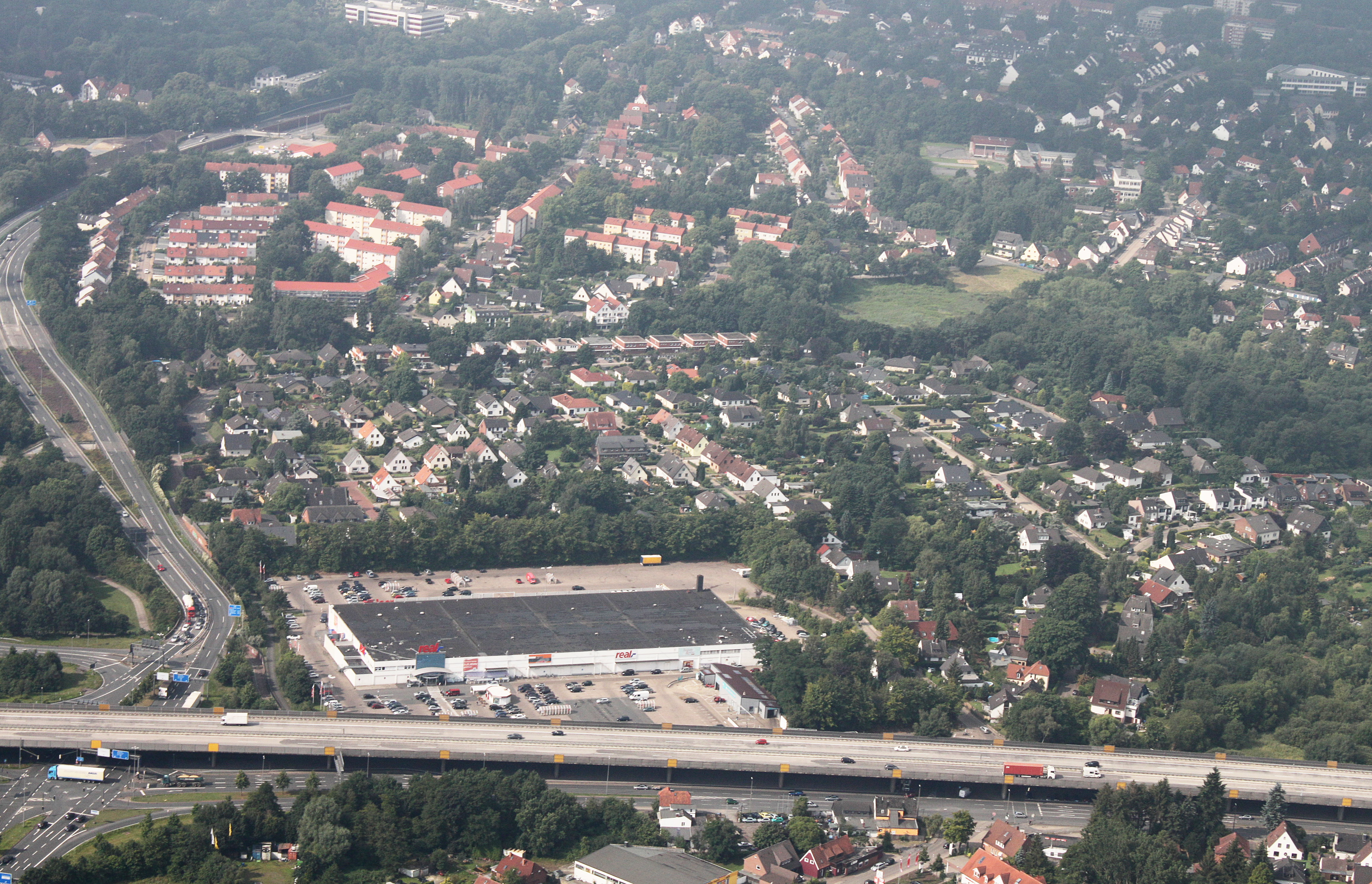 Fotoflug Bremen; Flughöhe 500 m; JVA Oslebshausen bis Abfahr Bremen Nord